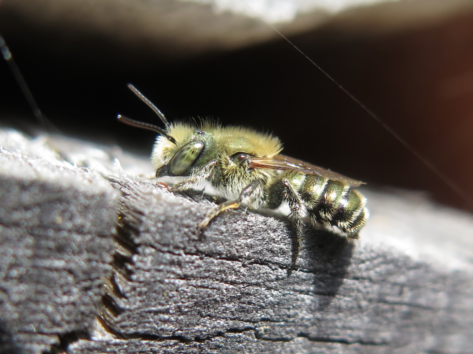 Männchen einer Stahlblauen Mauerbiene auf einer Wildbienennisthilfe im Kanton Schwyz